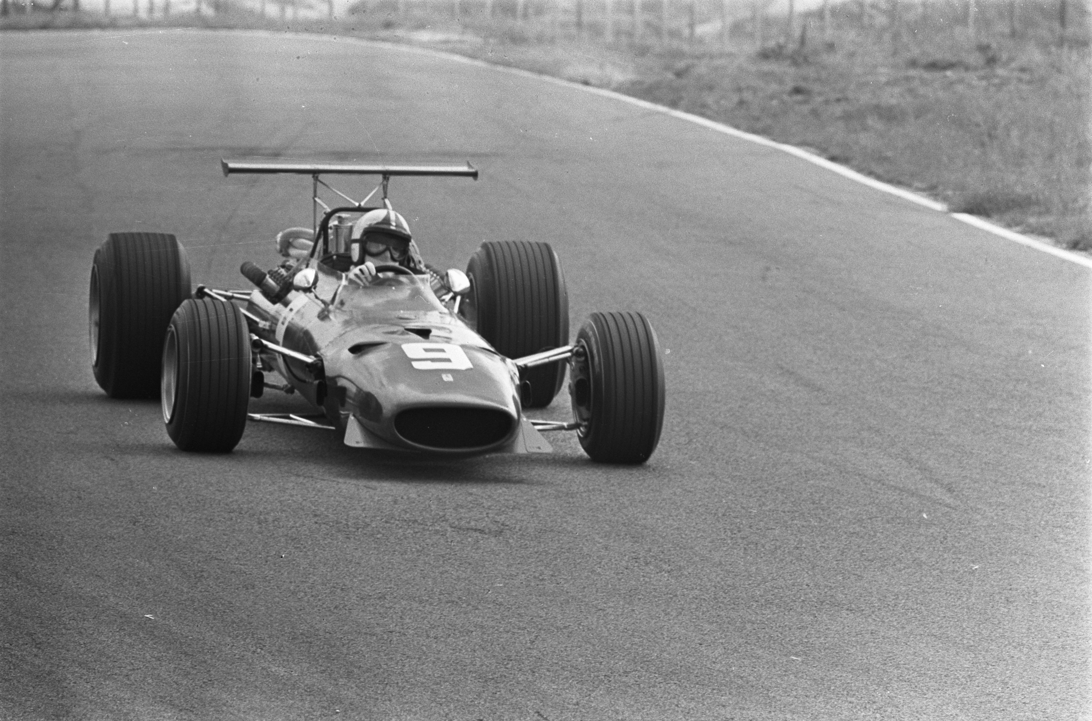 Collectie / Archief : Fotocollectie Anefo Reportage / Serie : [ onbekend ] Beschrijving : Grand Prix 68 Zandvoort .Chris Amon (Ferrari) Datum : 23 juni 1968 Locatie : Zandvoort Trefwoorden : autosport Persoonsnaam : Amon, Chris Fotograaf : Evers, Joost / Anefo Auteursrechthebbende : Nationaal Archief Materiaalsoort : Negatief (zwart/wit) Nummer archiefinventaris : bekijk toegang 2.24.01.05 Bestanddeelnummer : 921-4611